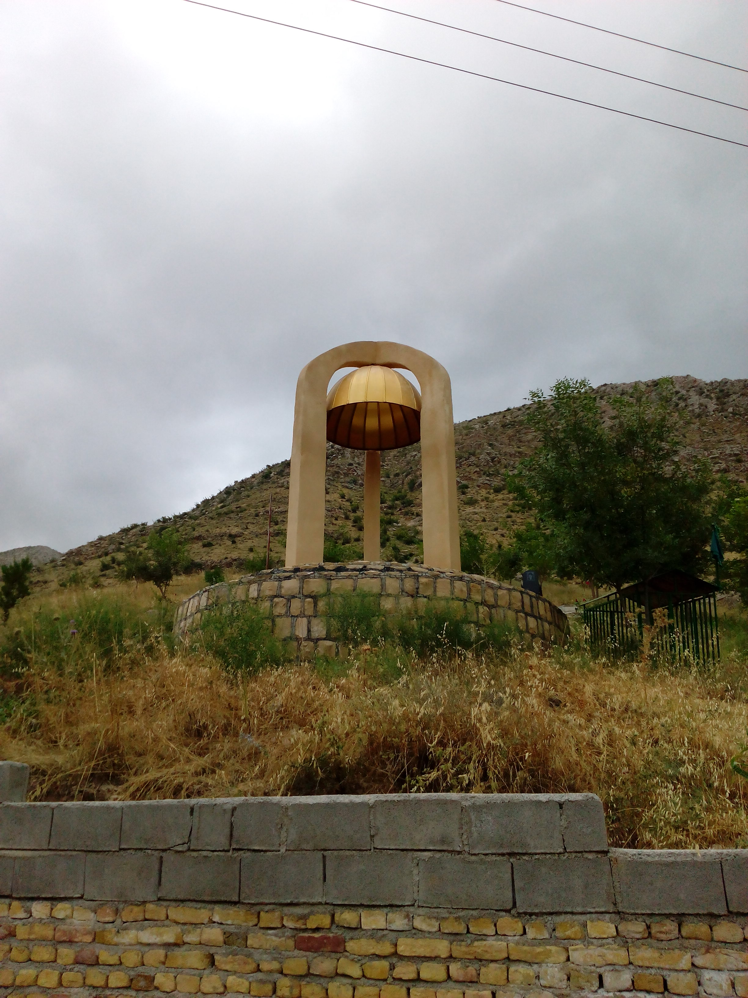 مقبره شهدای روستا